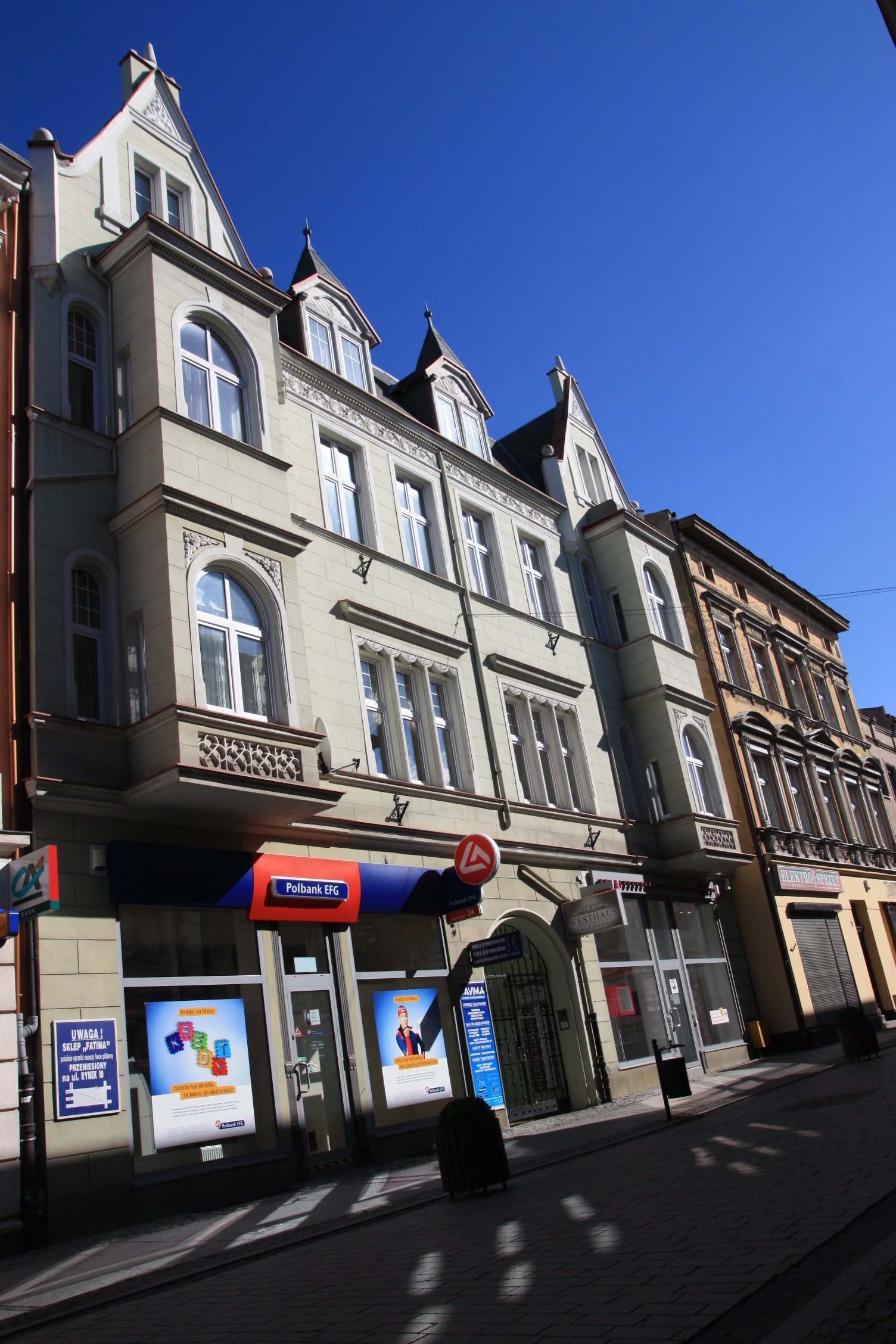 Inowrocław, ul. Królowej Jadwigi 14 - kamienica